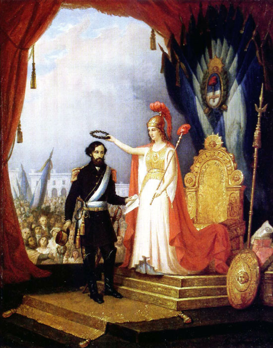 Baltassare Verazzi, en su "Alegoría del Gral. Bartolomé Mitre", que parece haber sido una alabanza política al vencedor de Pavón.